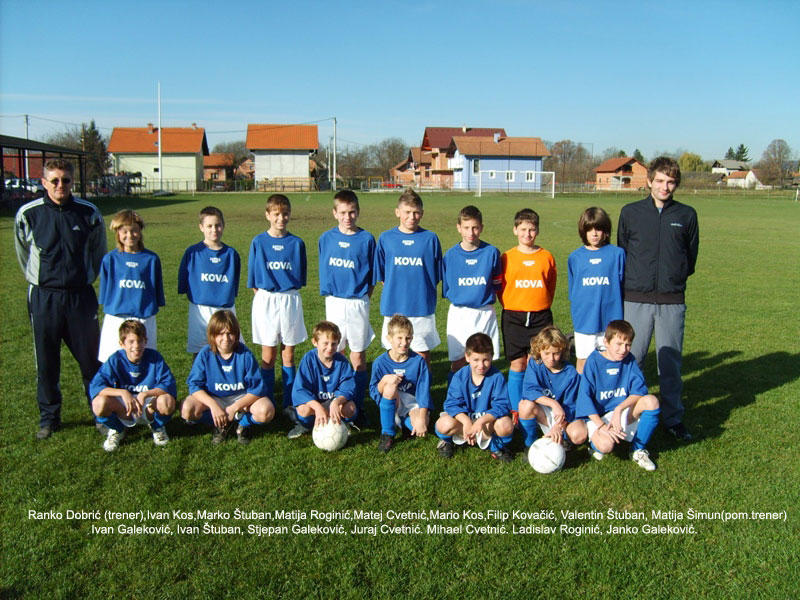 Mlađi pioniri Nk Mraclina.